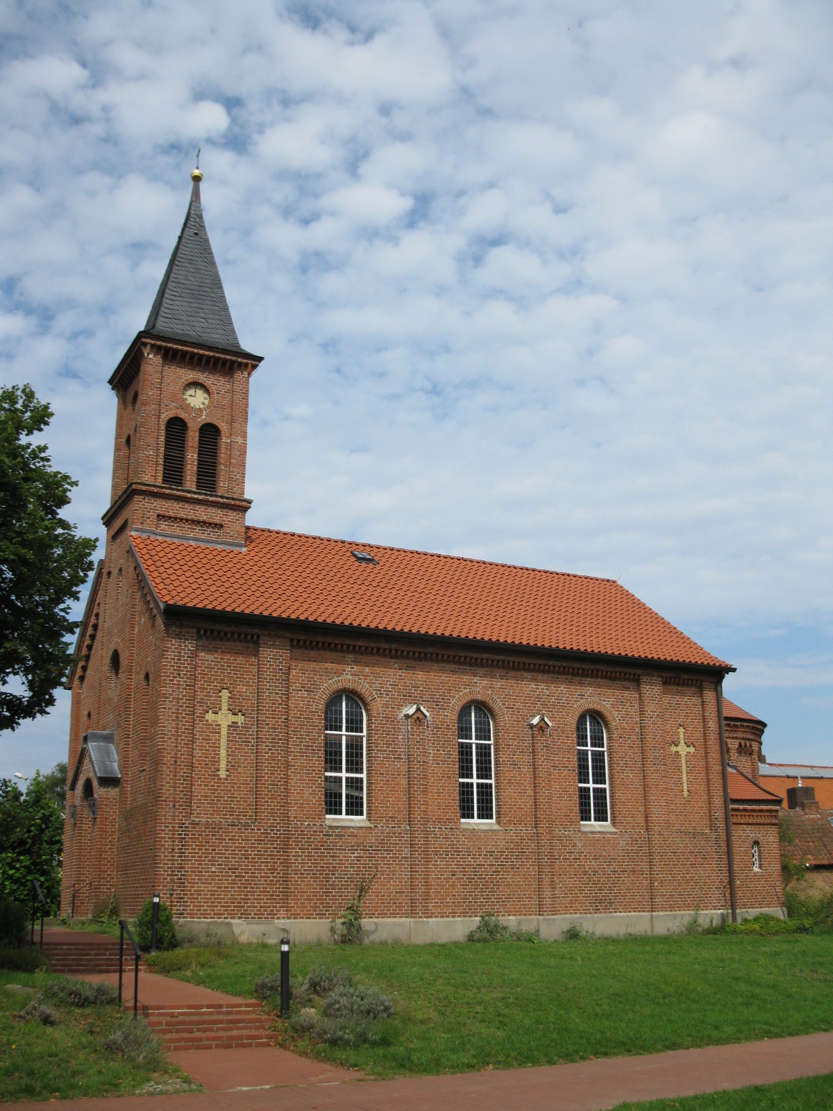 Die Südseite der Friedenskirche Küsten vom Kirchhof aufgenommen